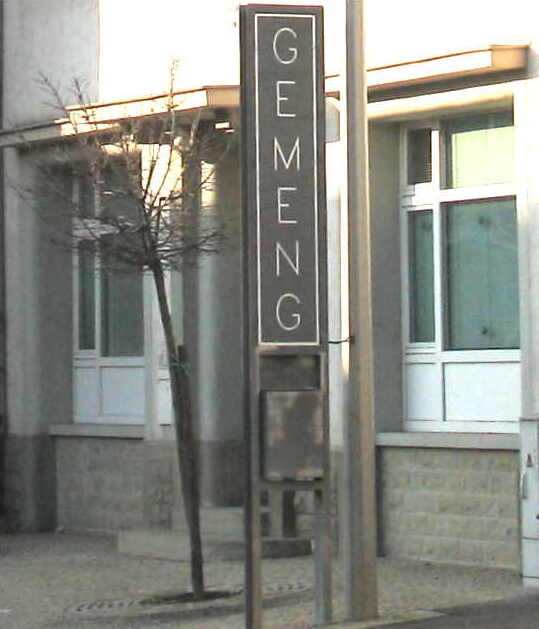 Schëld virun der Gemeng vu Bus